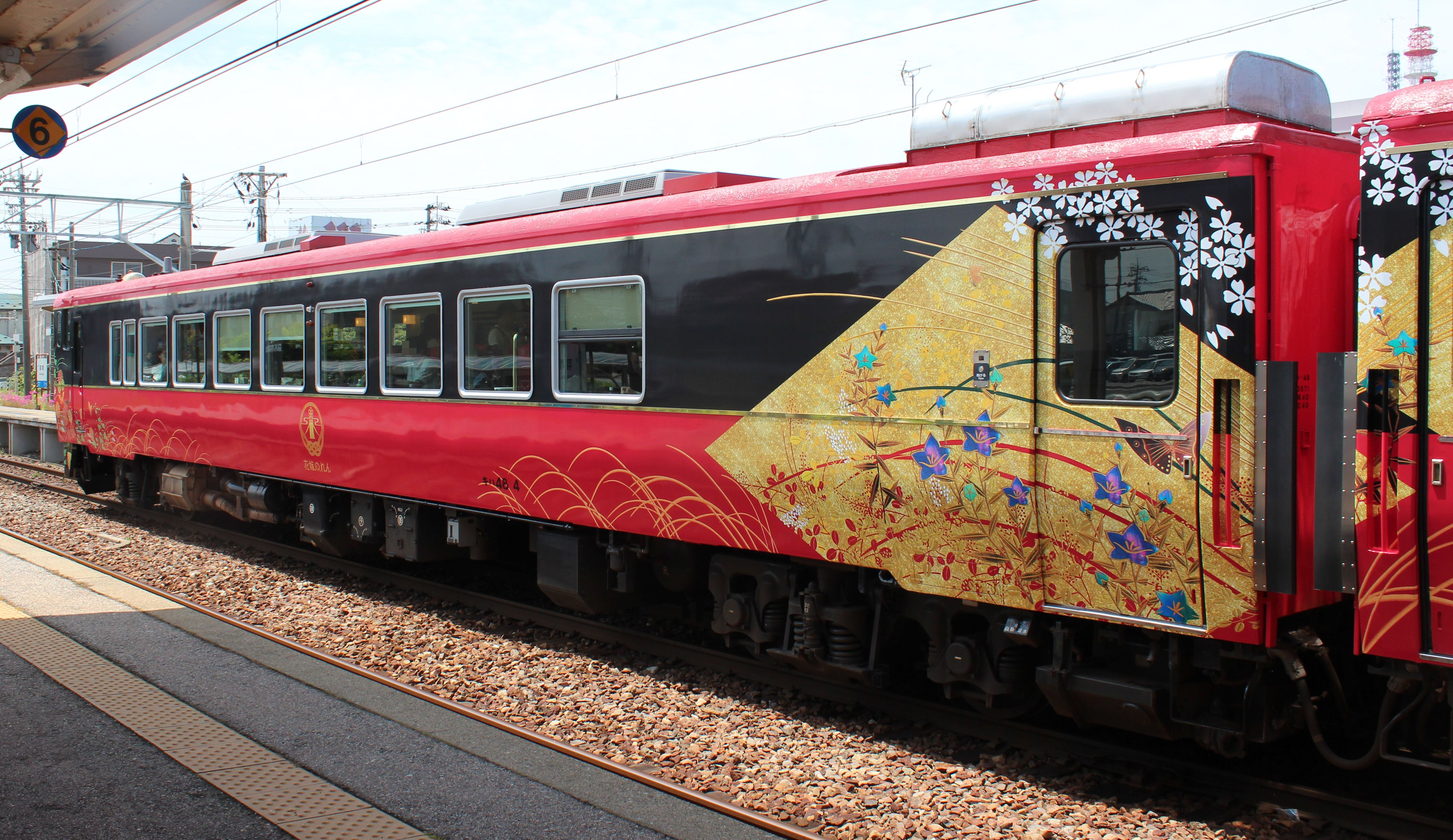 JR西日本キハ48系 七尾線ja:花嫁のれん_(列車) 羽咋駅で撮影